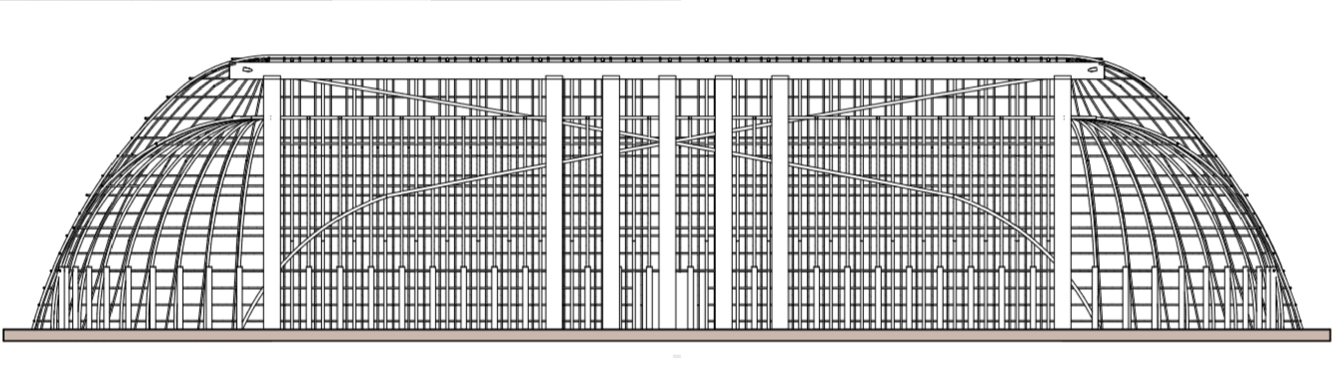 Construção feita em bambu, madeira e palha. Imagem produzida no programa Autodesk Revit.